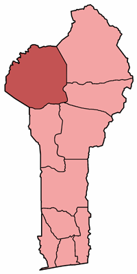 Mappa della diocesi di Natitingou, nel Bénin. Lavoro personale, eseguito a partire da questa immagine di Commons. Fonte per i confini delle diocesi: Guida delle missioni cattoliche 2005, a cura della Congregatio pro gentium evangelizatione, Roma, Urbaniana University Press, 2005. Categoria:Chiesa cattolica in Benin